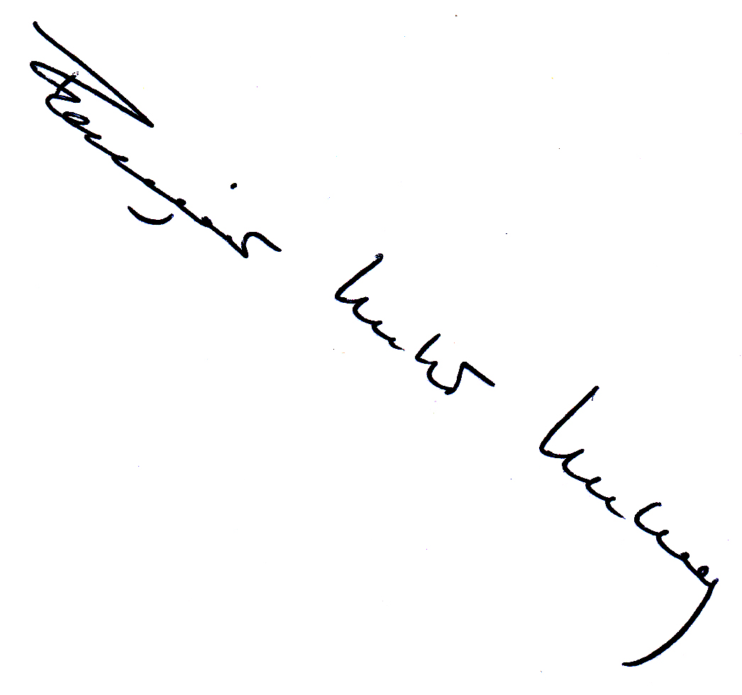 Unterschrift von Francois Maher Presley